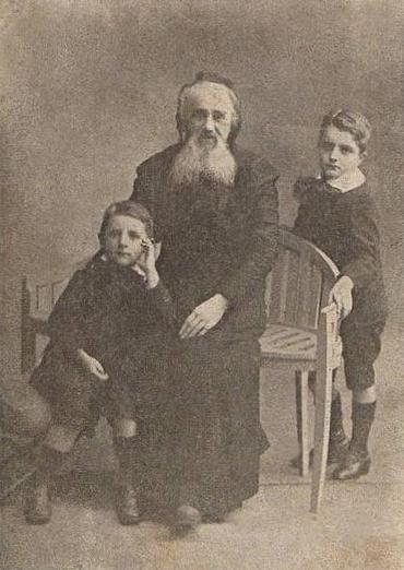 Madame Lestienne vers 1910, carte publicitaire